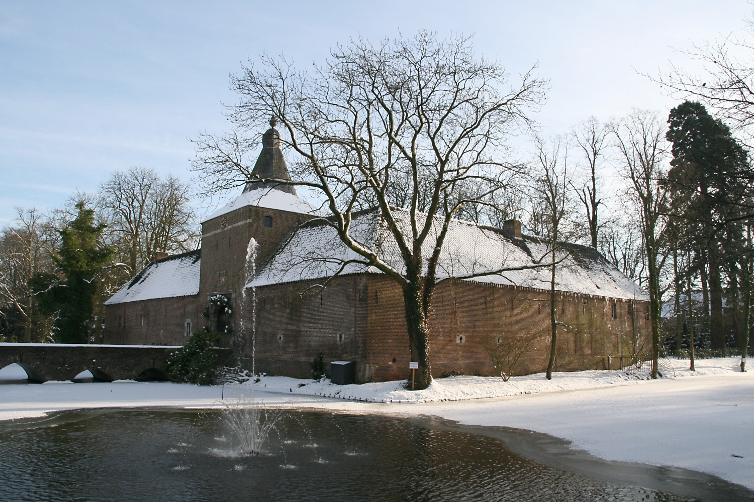 Arcen: Buitenzijde Kasteel Arcen, met sneeuw